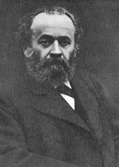 Karl Attenhofer (1837–1914) Komponist, Dirigent, Sänger, Organist und Universitätsmusikdirektor. Fotografie Eduard Abel, Zürich